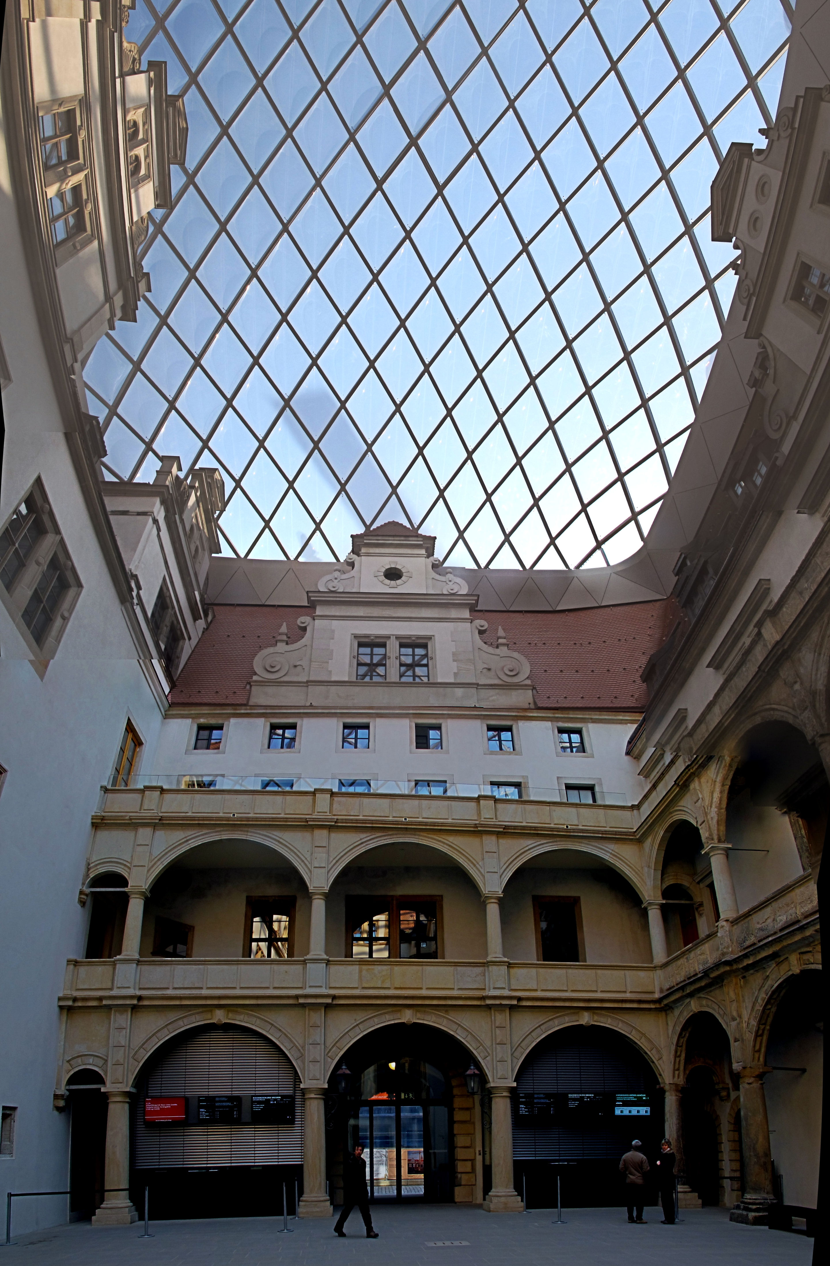 Deutschland, Sachsen, Dresden, Lichthof Residenzschloss mit Glasdach